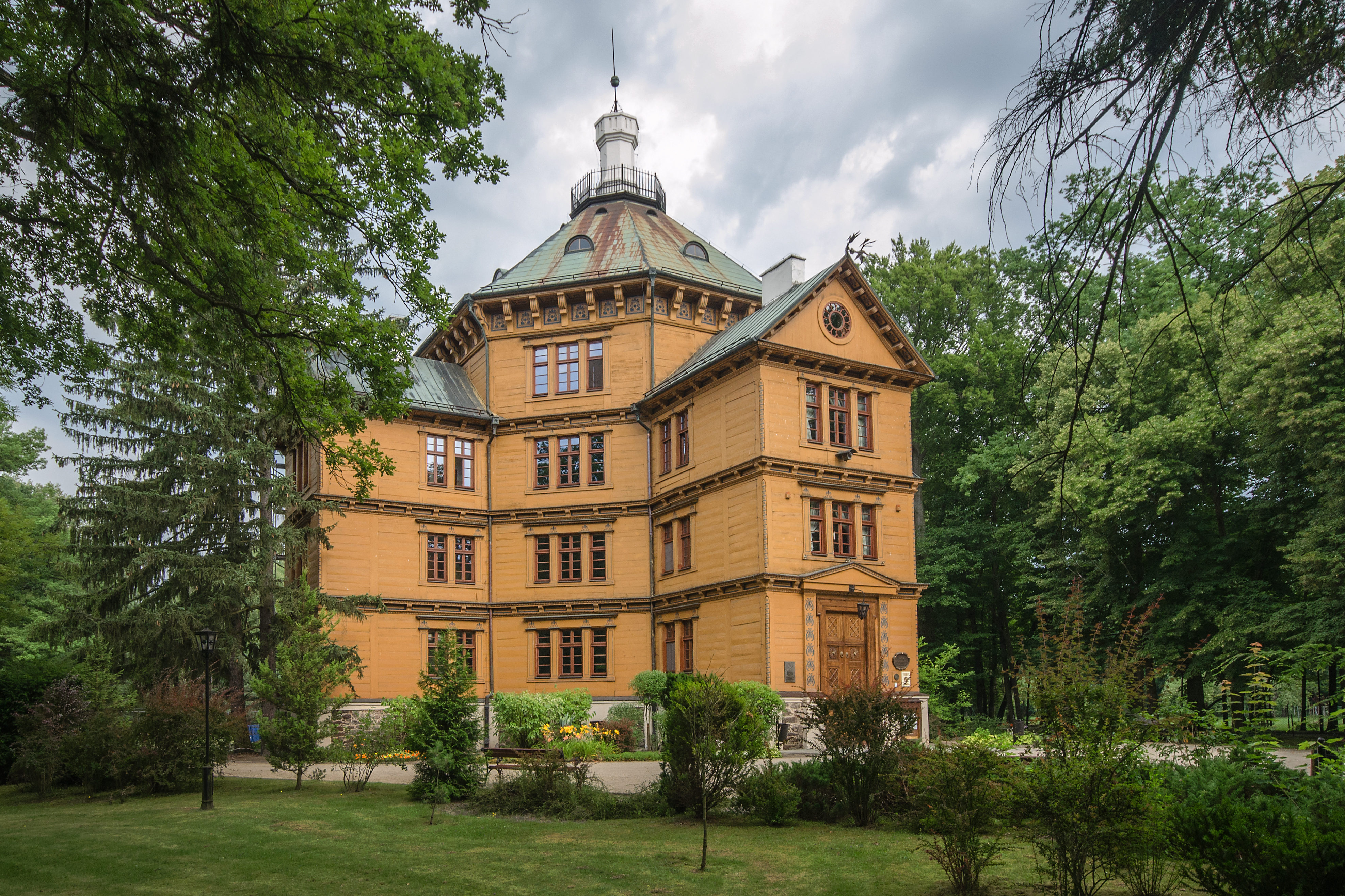 Antonin, pałac myśliwski, 1 poł. XIX